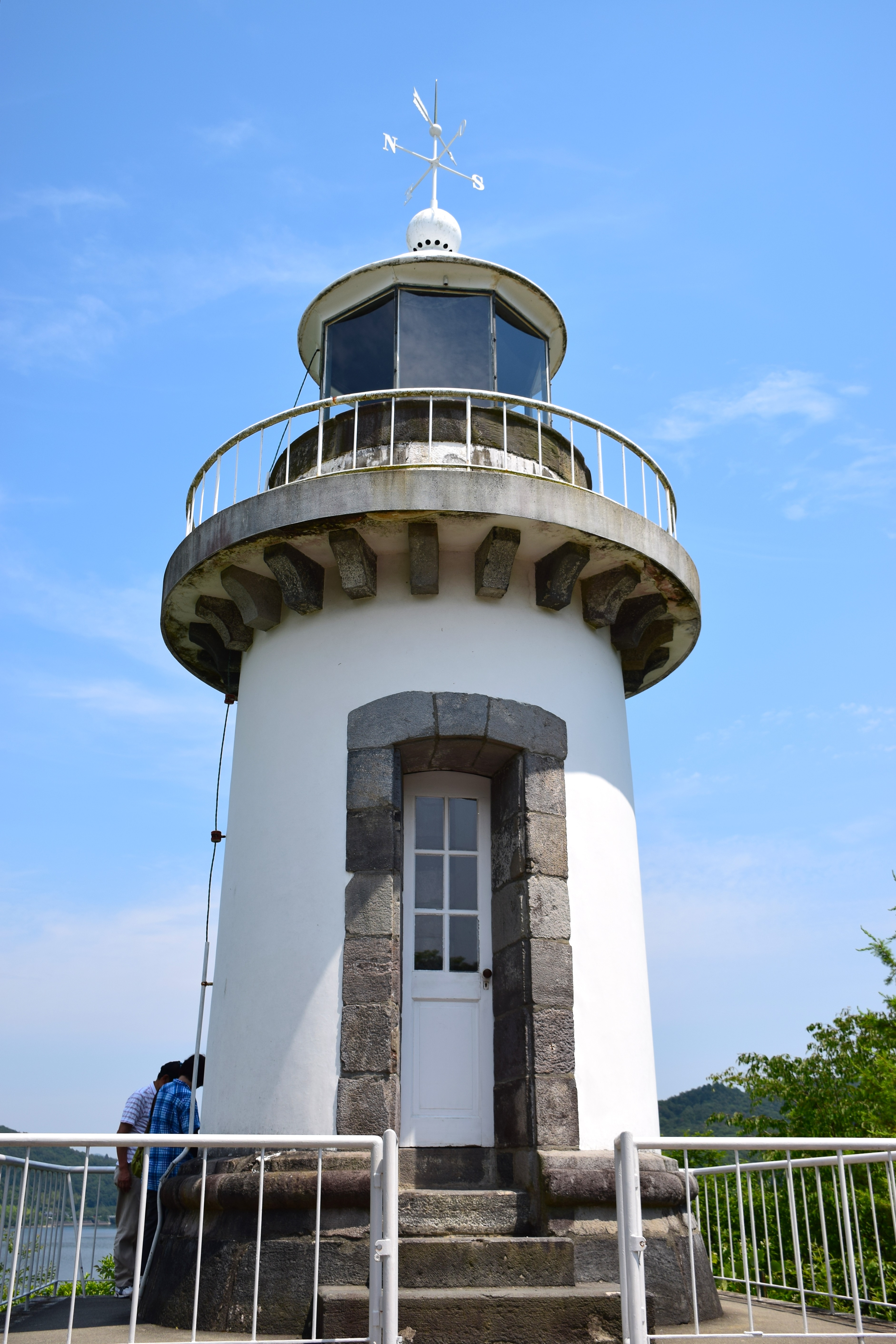 明治村 品川灯台